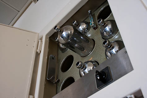 kruikenmoeder